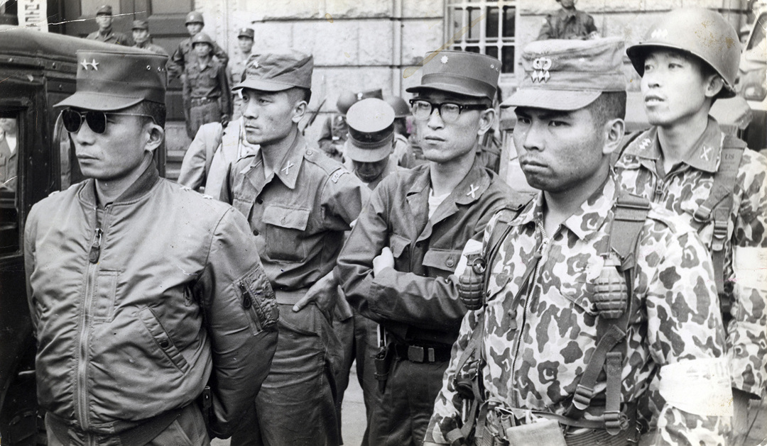 1961년 5 월 18일 시청 앞의 육사생도 행진이 있었다. 왼쪽부터 박정희, 박종규, 이낙선, 차지철.